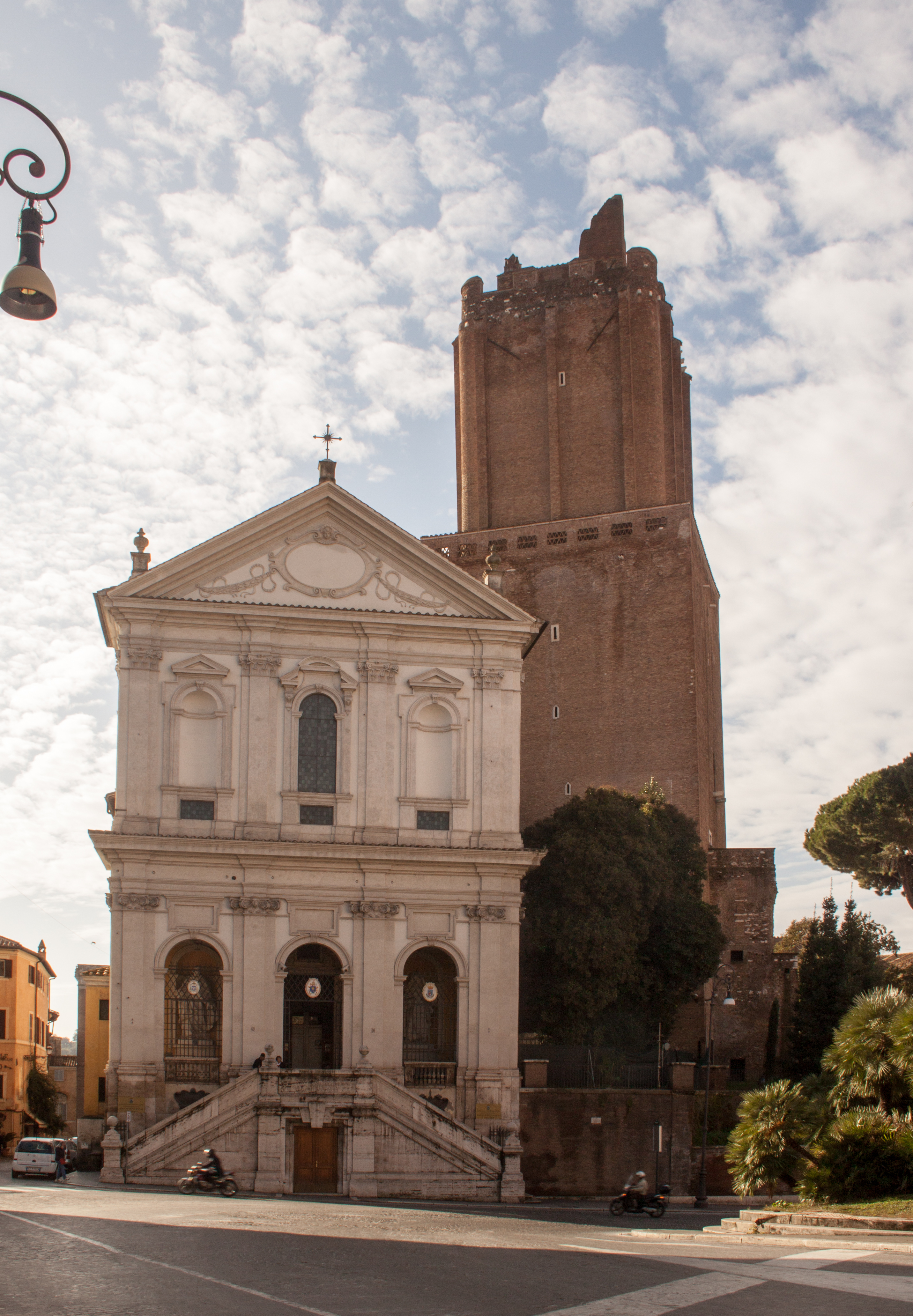 Torre_delle_Milizie, S. Caterina da Siena (a Magnanapoli)